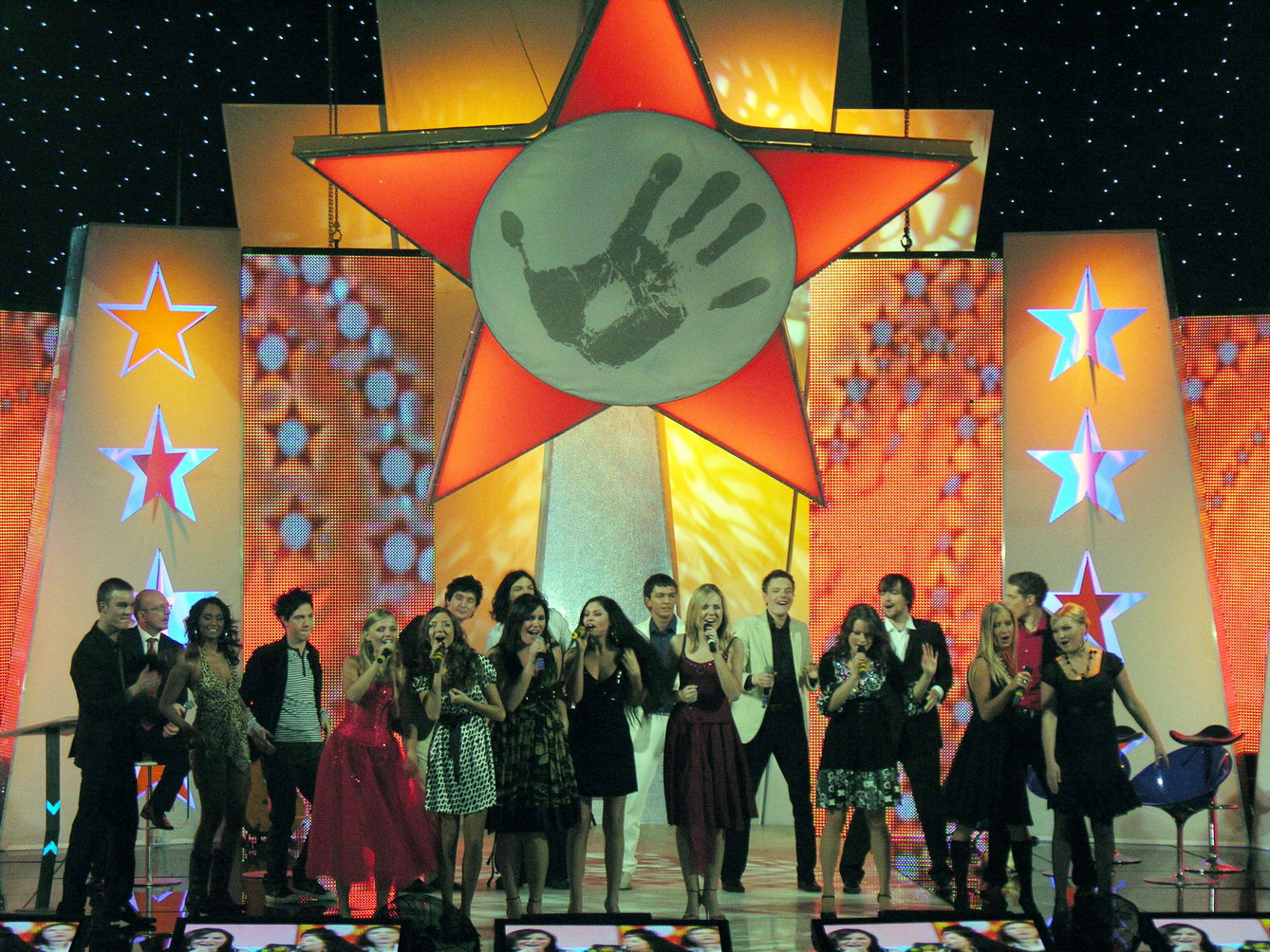 KĮŽ3 koncerto Mažeikiuose metu, 2007-12-08